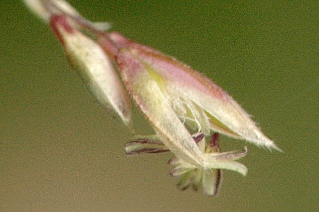 Picture taken in Commanster, Belgian High Ardennes . Species: Holcus lanatus